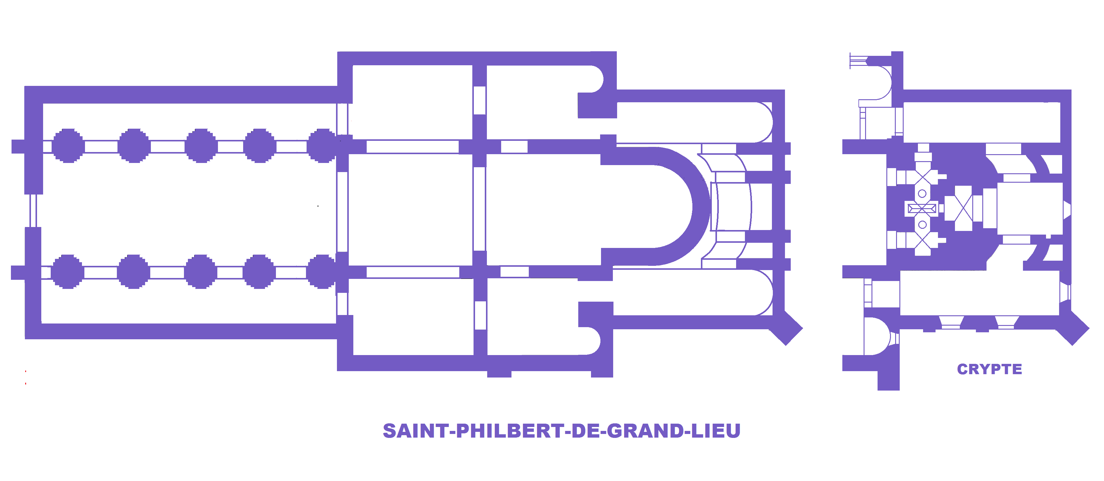 Abbatiale de Saint-Philbert-de-Grand-Lieu, Plans